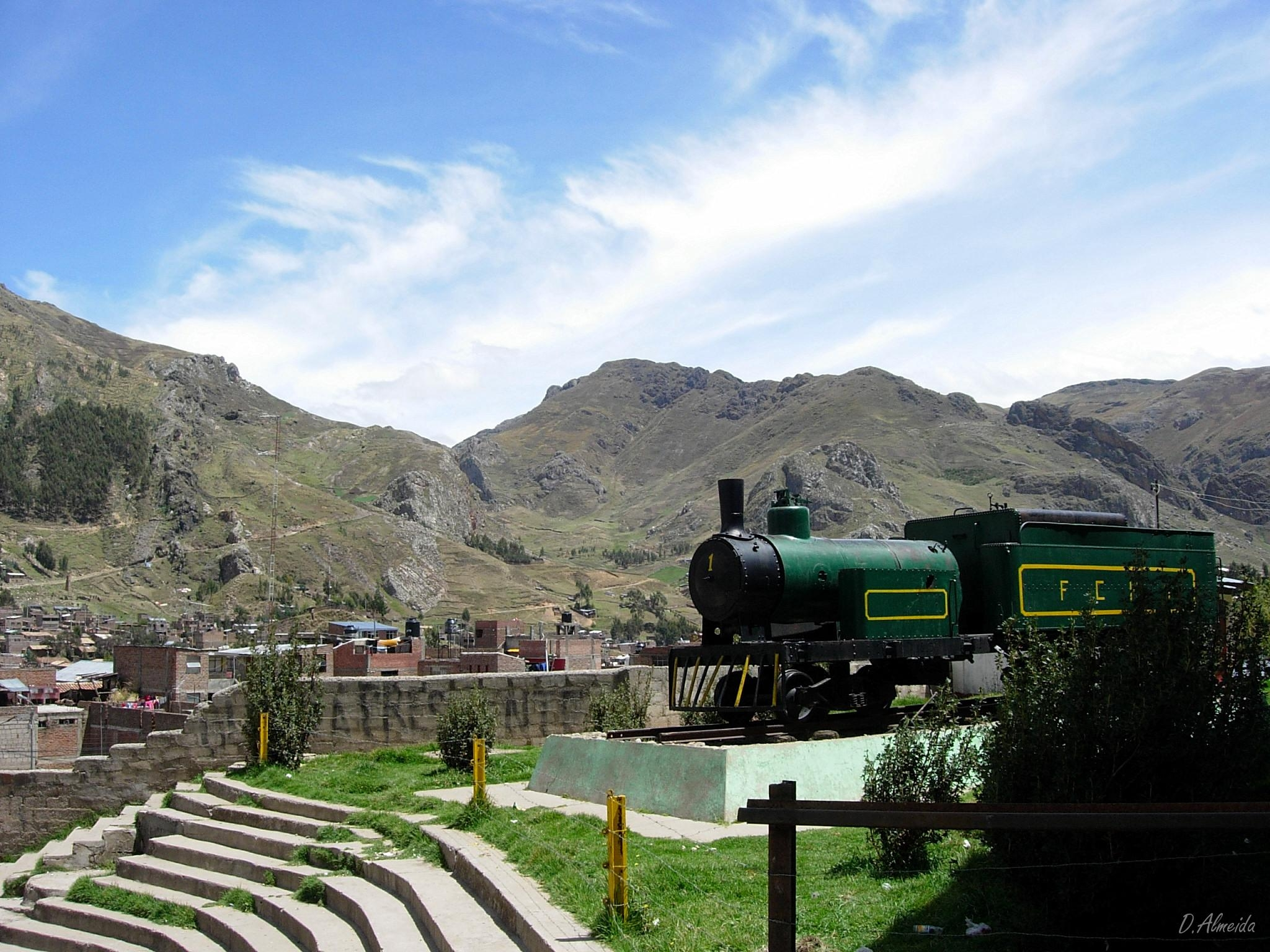 Tren Macho sin uso. Licensing